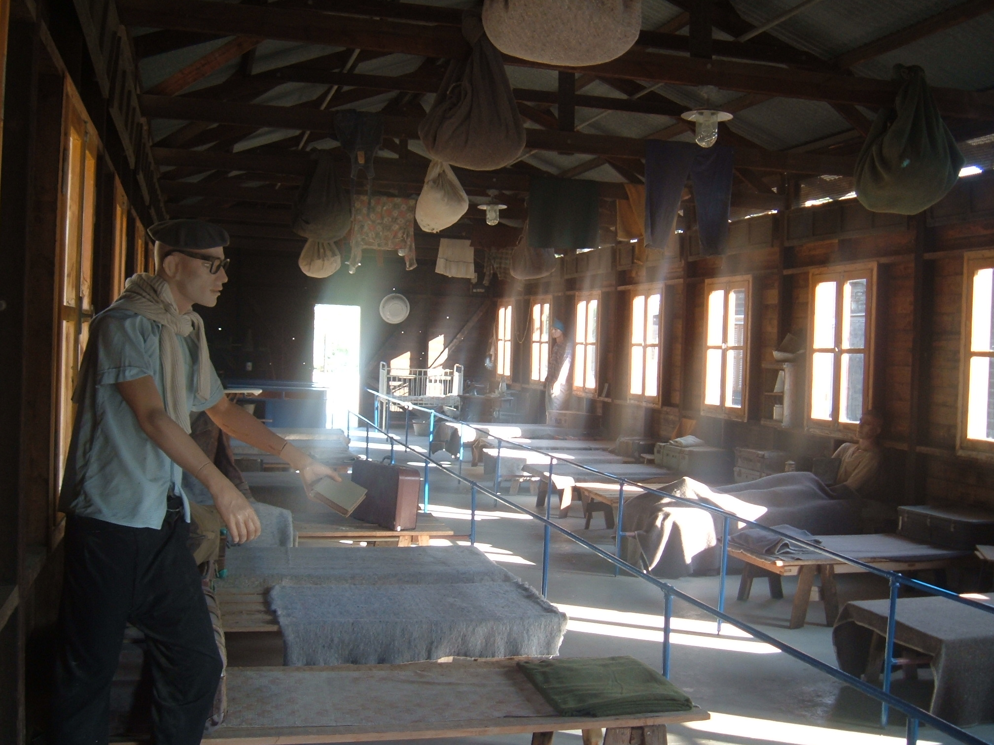 reconstructed interior of prisoner's barracks, at;it former detainee camp, israel.פנים משוחזר של צריף האסירים במחנה המעצר בעתלית, כיום מוזיאון ההעפלה על שם משה סנה, עתלית